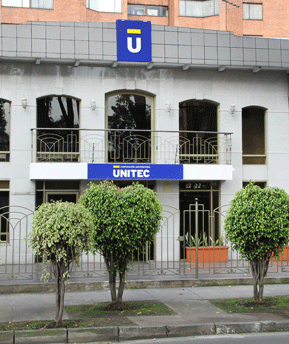 Edificio sede unitec